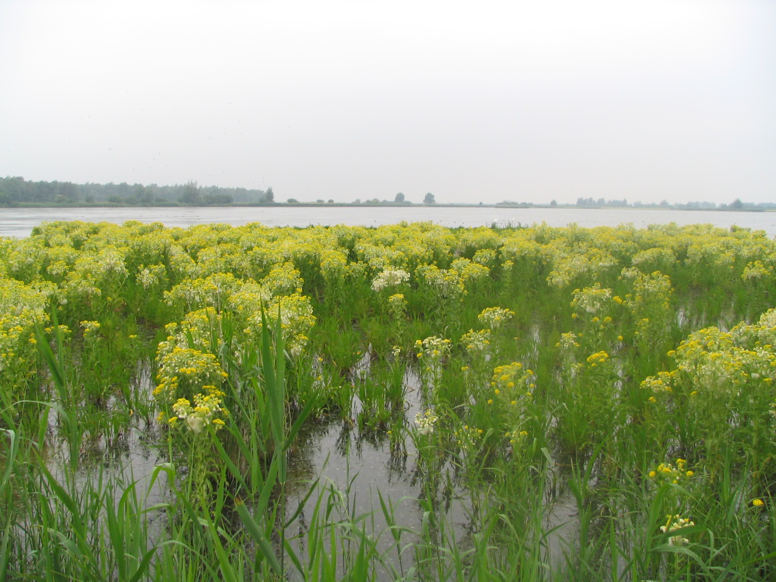 Eigen foto. Oostvaardersplassen 10-juni-2004 GerardM 11 jun 2004 09:28 (CEST)